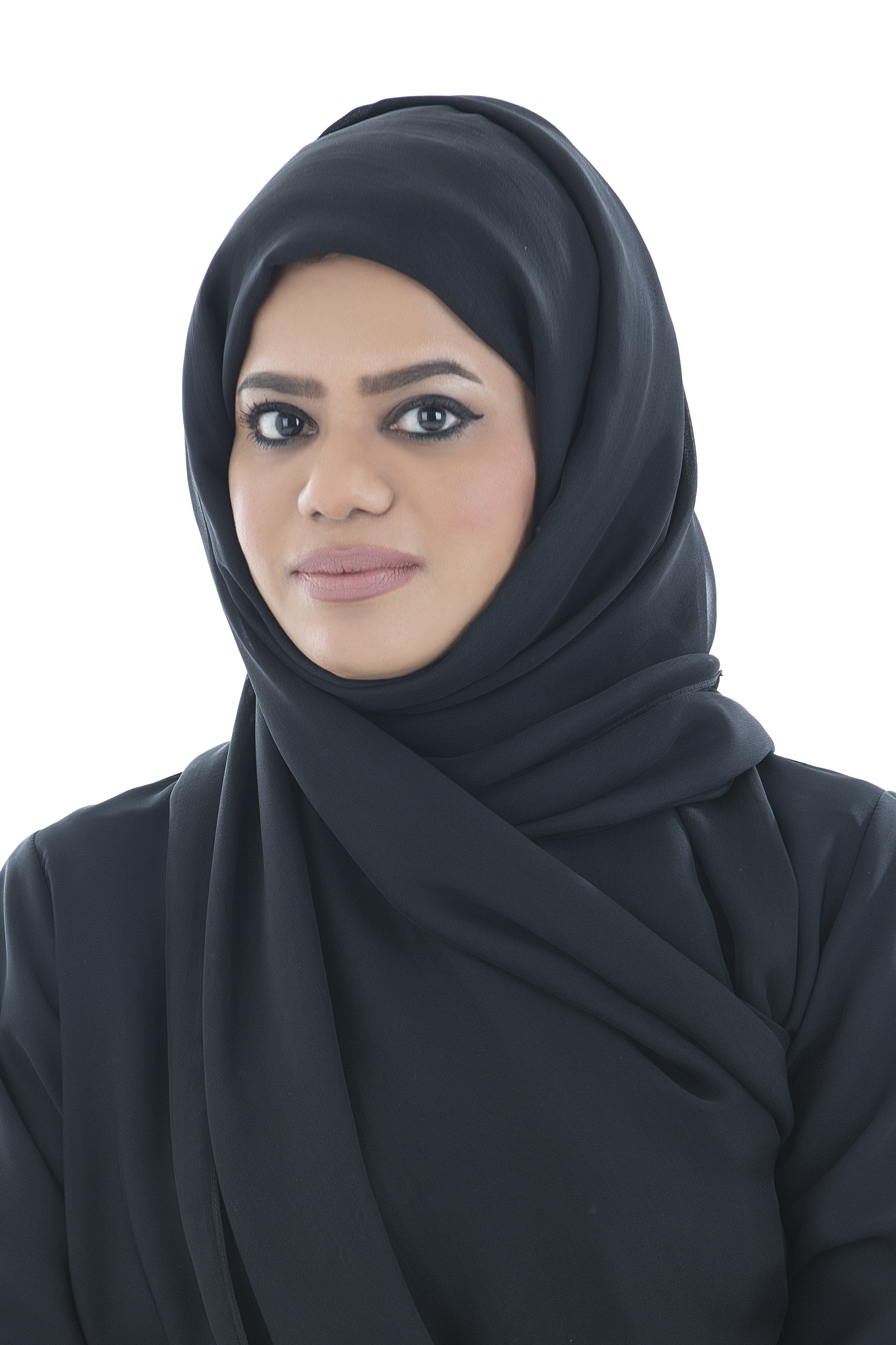 منى بوسمرة